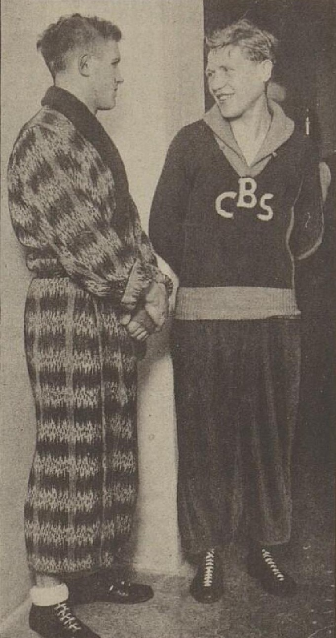 František (Franta) Nekolný (1907-1990), československý boxer